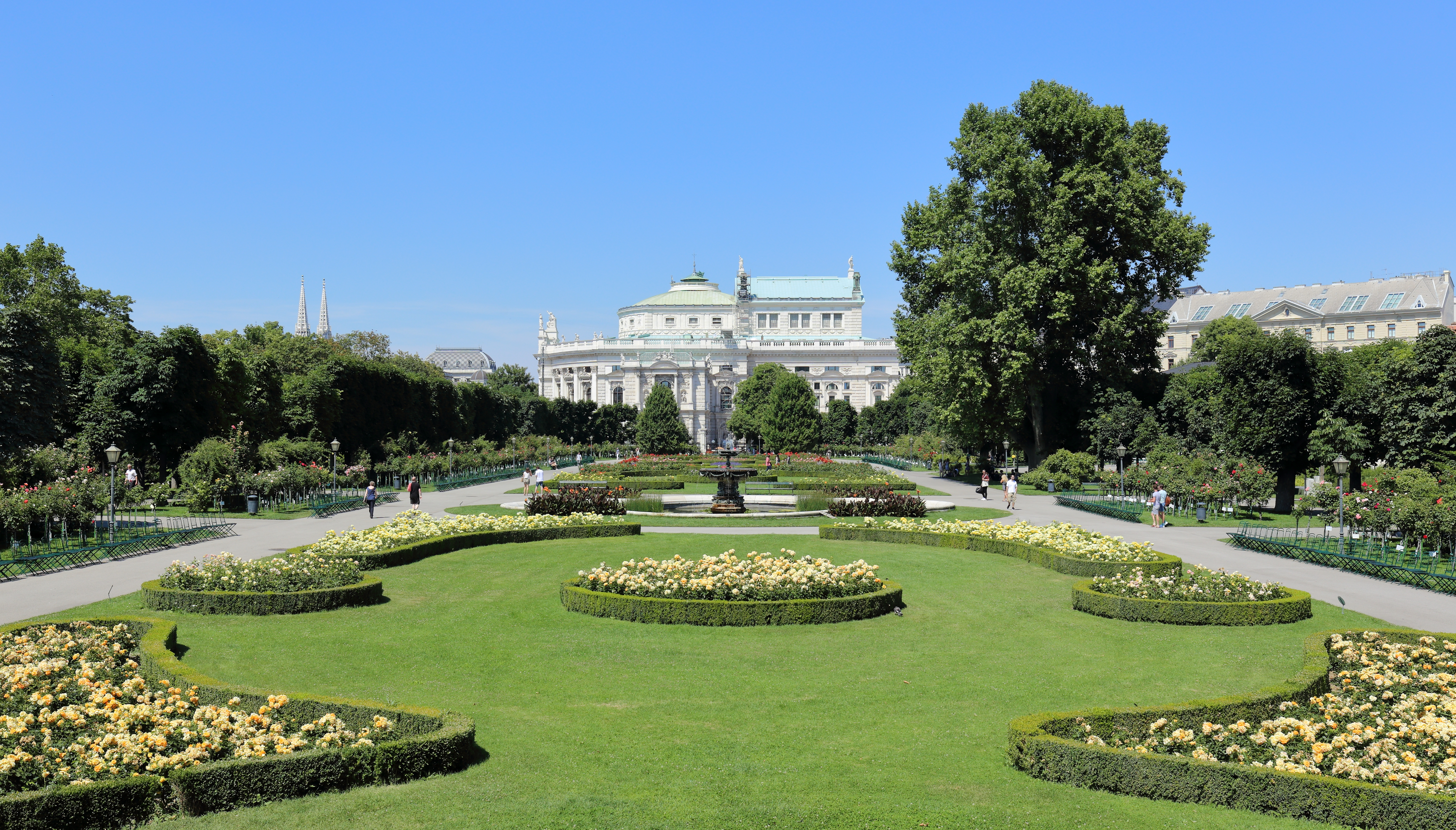 Der westliche Bereich, auch Rosengarten bezeichnet, des Volksgarten im 1. Wiener Gemeindebezirk Innere Stadt.Im Zentralbereich des Rosengartens, ein französisch-barocker, architektonisch strenger Plangarten, der Volksgartenbrunnen, dahinter das Burgtheater und rechts vom Volksgartenbrunnen die unter Naturschutz stehende Morgenländische Platane.Der Volksgarten wurde zwischen 1819 und 1907 in mehreren Etappen gestaltet. Die erste Etappe nach der Zerstörung der Burgbastei durch die Franzosen (1809) und dadurch des Baues des neuen äußeren Burgtores (1821-1823) wurde auch der Volksgarten nach einem Konzept von Ludwig von Remy angelegt und am 1. März 1823 eröffnet. Die zweite Etappe erfolgte im Zuge der Auffüllung des Stadtgrabens (1862), wodurch der Volksgarten bedeutend erweitert wurde. Die letzte Etappe erfolgte im Zuge der Aufstellung des Kaiserin-Elisabeth-Denkmals (enthüllt am 4. Juni 1907), indem durch Friedrich Ohmann der nordöstliche Teil des Volksgartens für die Aufstellung des Denkmals wesentlich verändert wurde. This media shows the natural monument in Vienna with the ID 376.